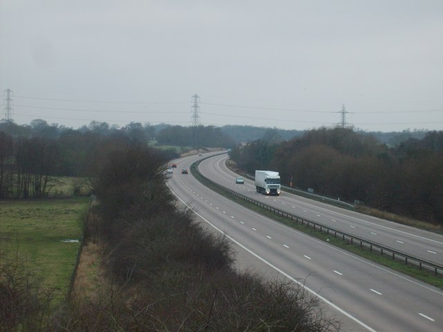 M54 looking West